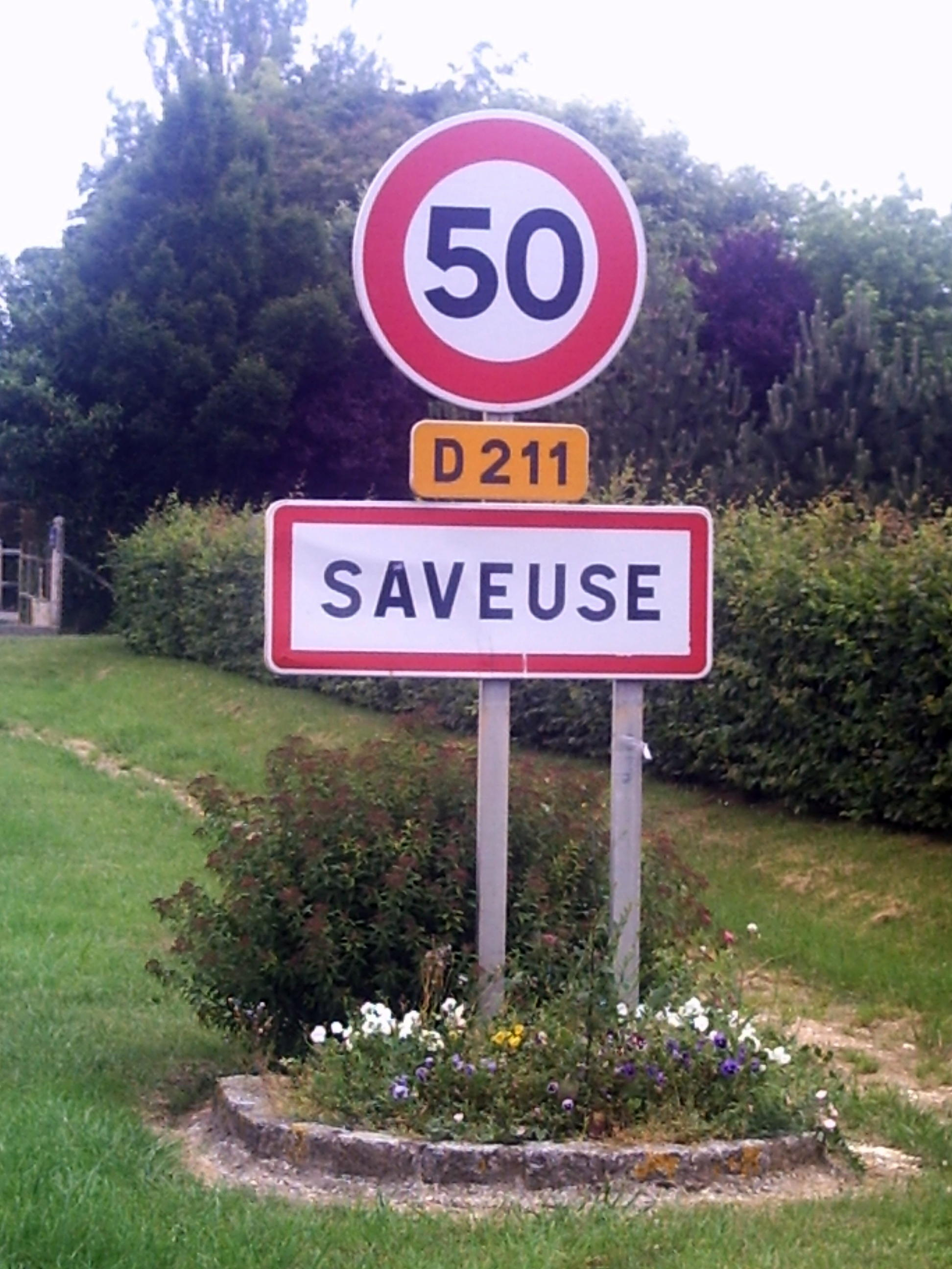 Saveuse (Somme, France) Panneau